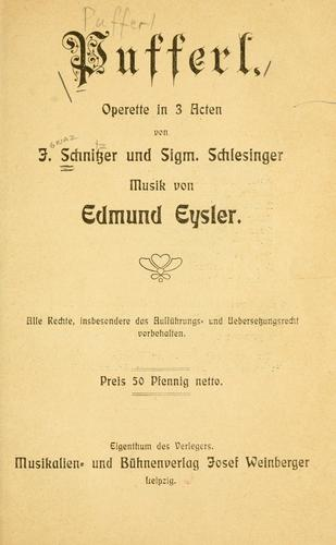 "Pufferl" by Ignaz Schnitzer, "Pufferl". Operette in 3 Acten von I. Schnitzer und Sigm. Schlesinger ; Musik von Edmund Eysler.